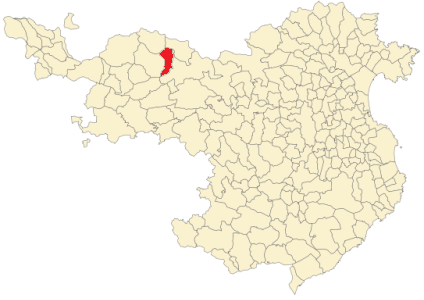 Situación de Llanars en la provincia de Gerona.